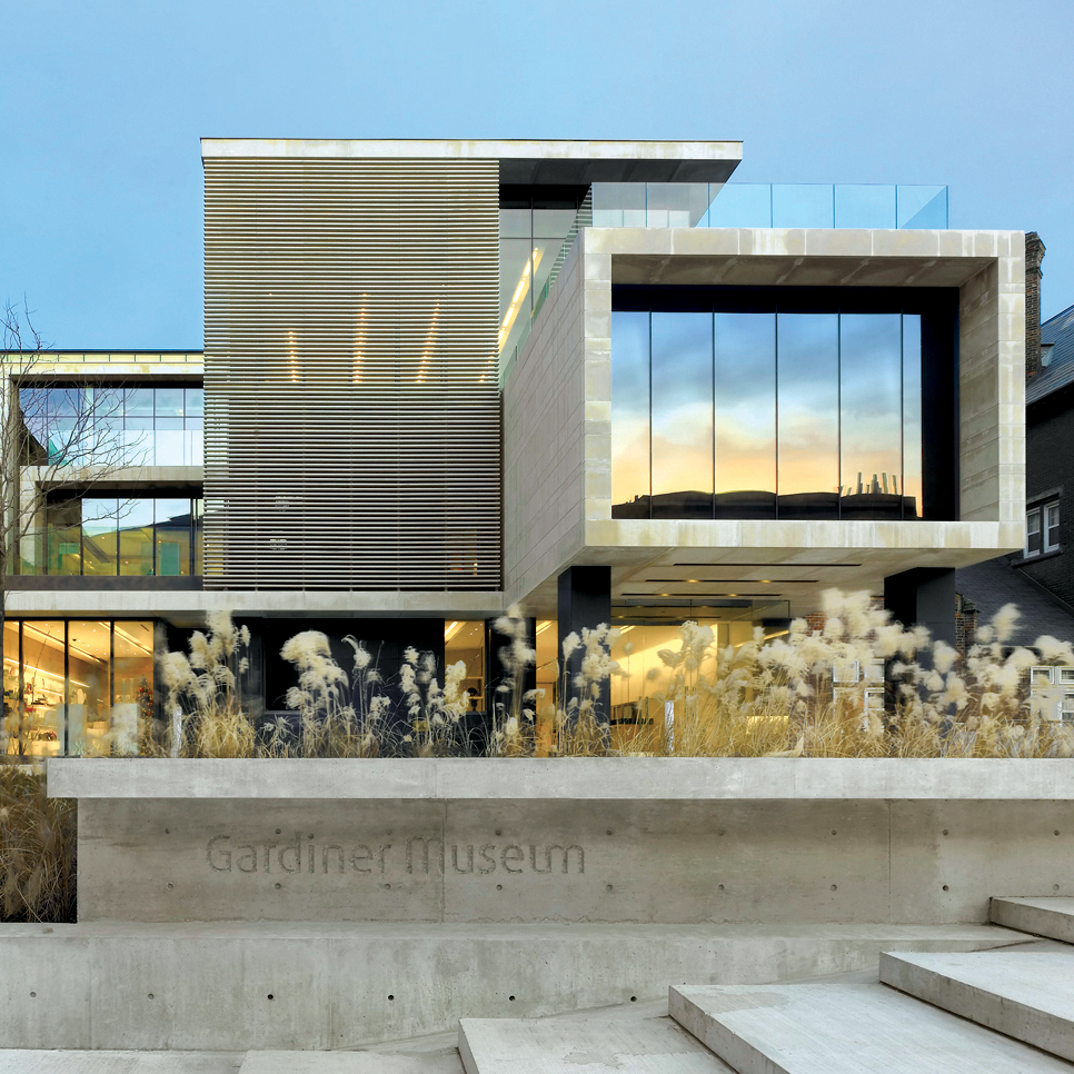 Gardiner Museum, Toronto, Canada.